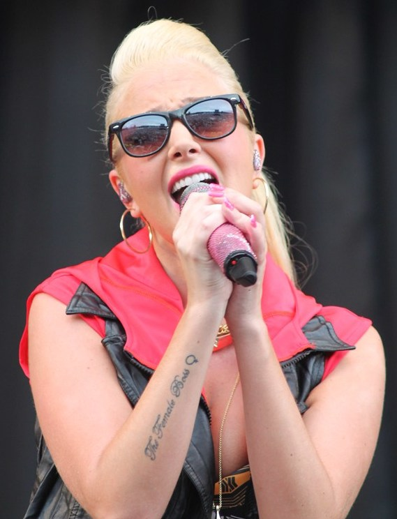 Tulisa